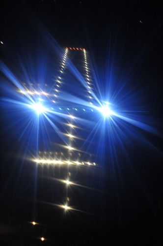 Nachtaufnahme: Beleuchtung / Befeuerung der Landebahn am Flugplatz Strausberg EDAY.